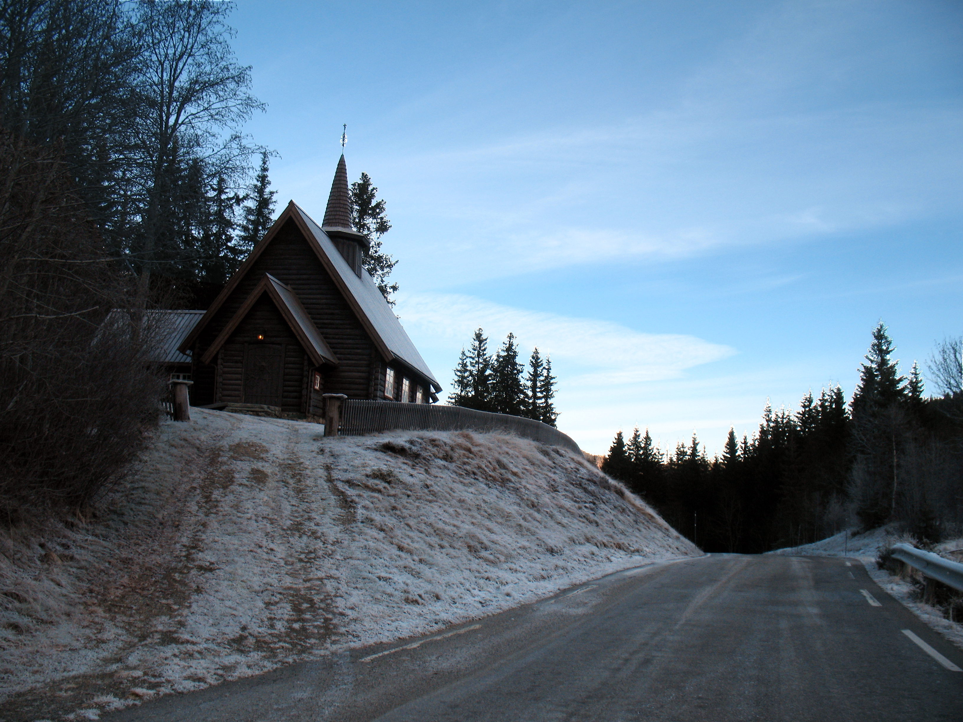 Fylkesveg 504 i Telemark går mellom Bråten og Langlim i Seljord kommune. Vegen er 11,1 km lang. Mandal kapell.